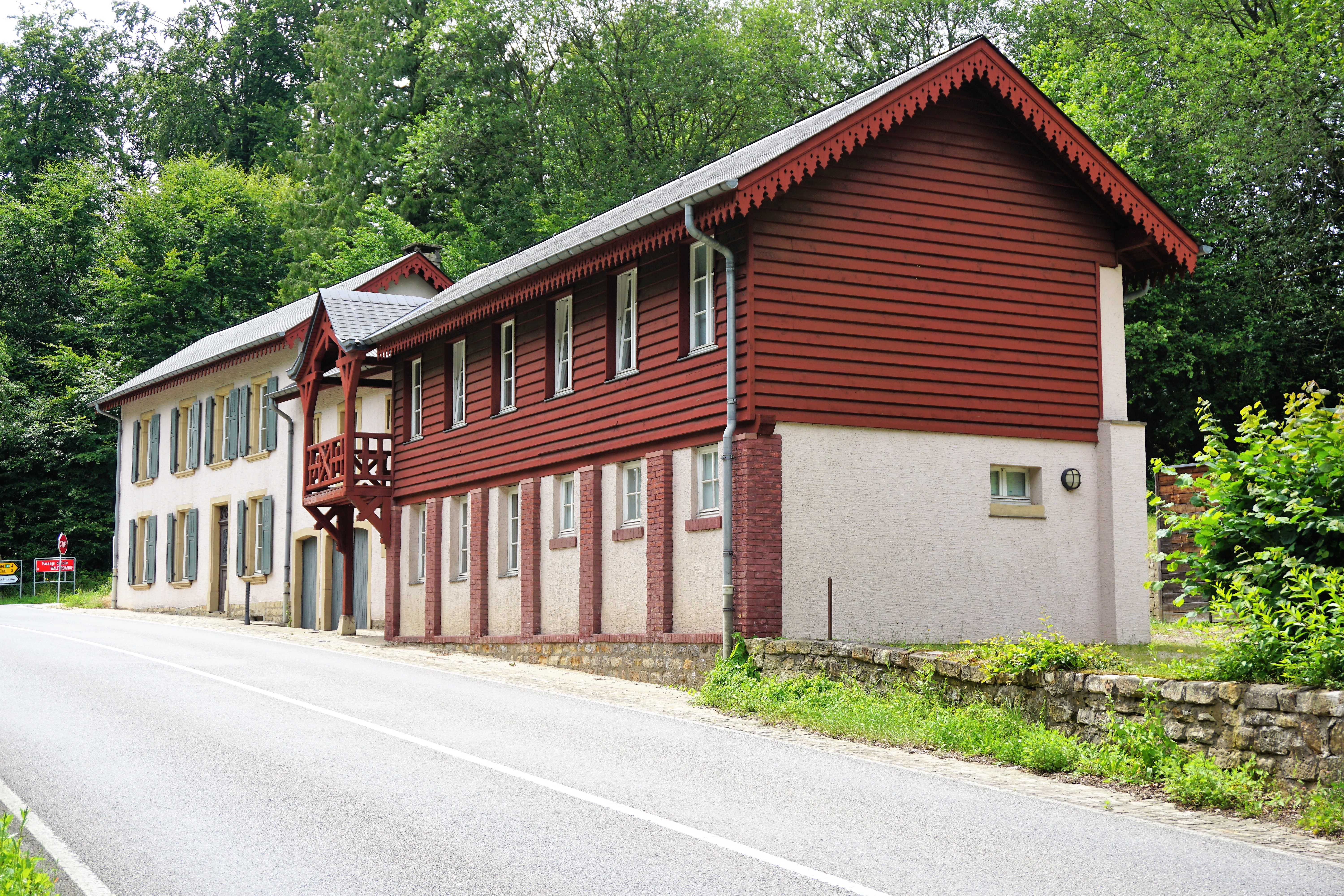 Luxembourg, lieu-dit Staffelstein (Stafelter), commune de Niederanven. Les bâtisses le long du CR119.